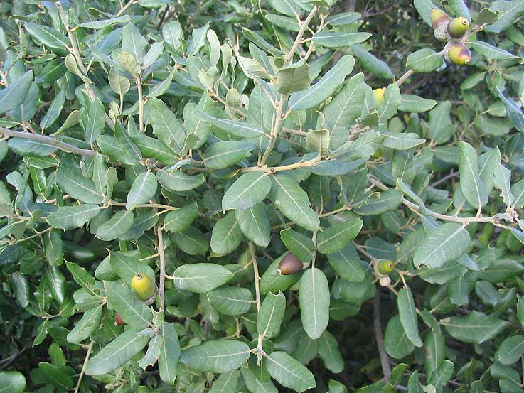 Chêne vert (Quercus ilex), feuilles et glands. Photo prise à Ille-sur-Têt (Pyrénées-Orientales, France).